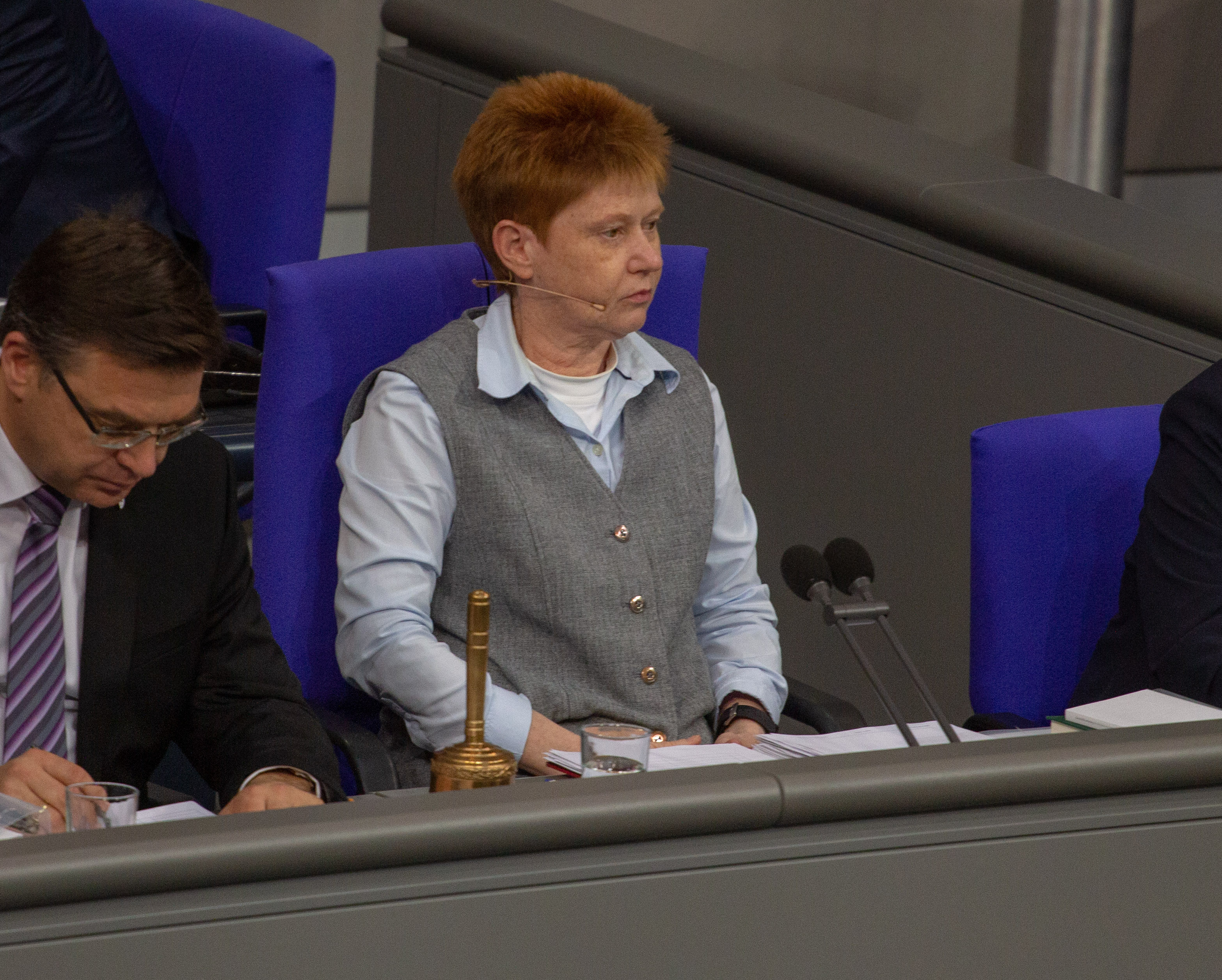 Petra Pau, Mitglied des Deutschen Bundestages, während einer Plenarsitzung am 11. April 2019 in Berlin.